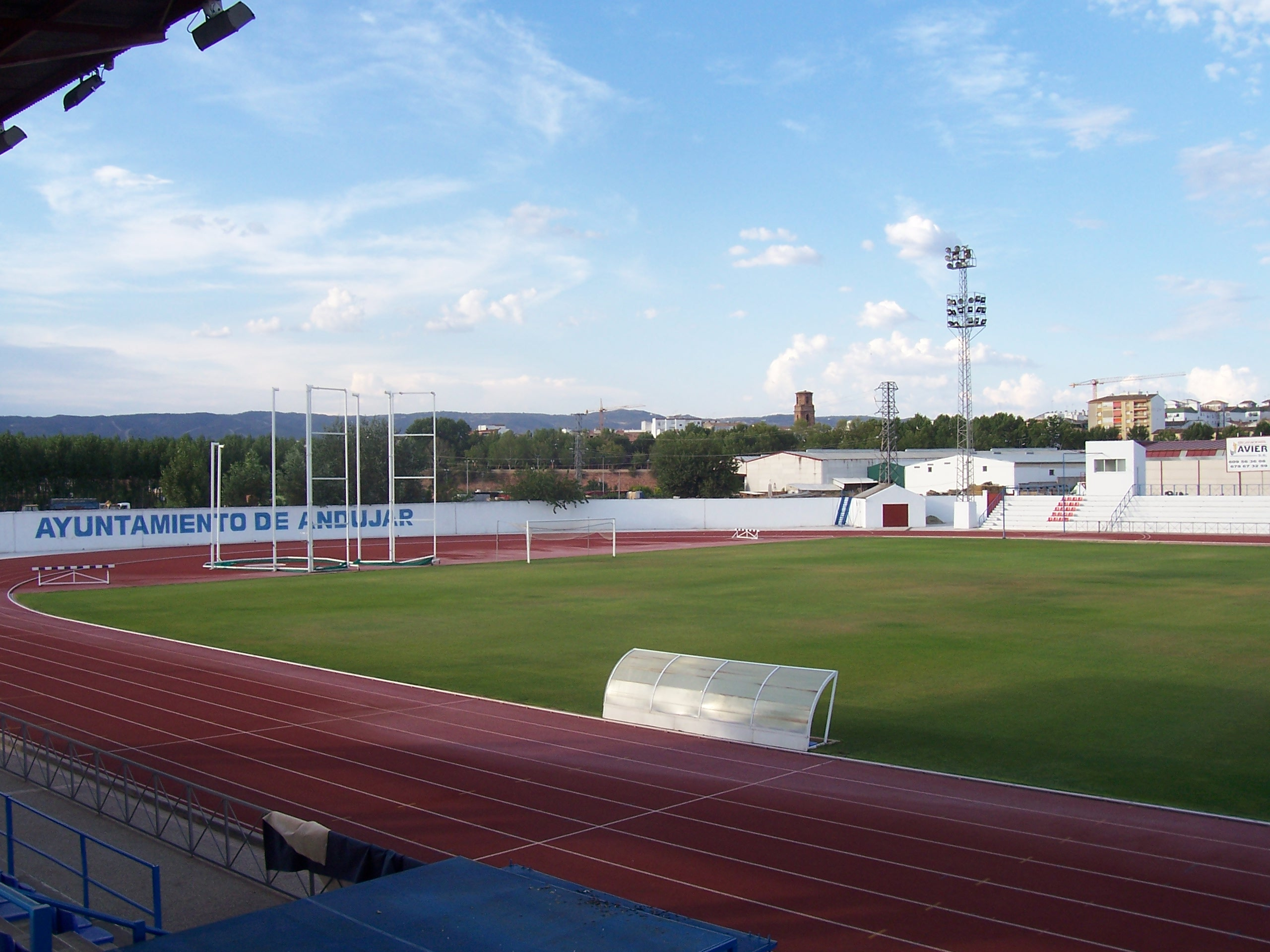 Nuevo Estadio Municipal de Andújar, en Jaén (España)